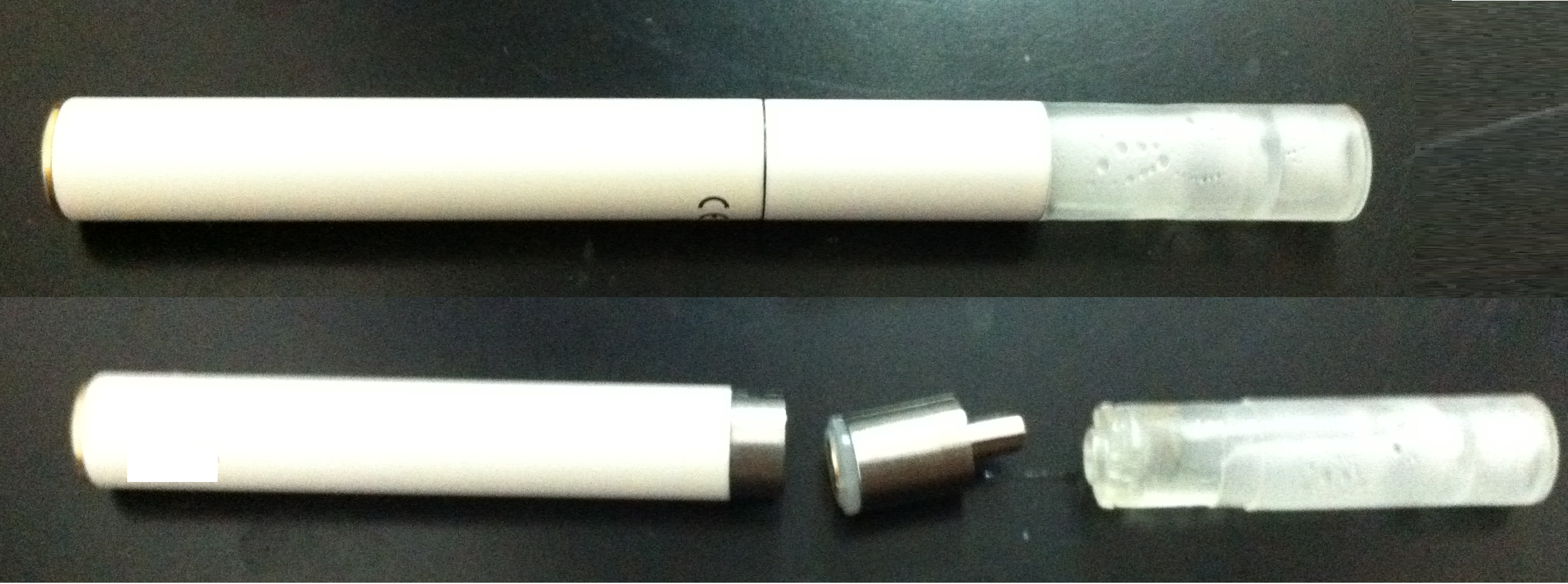 אוטומייזר